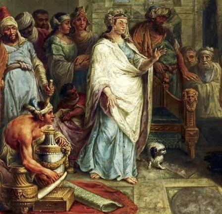 Ausschnitt aus einer Supraporte im Neuen Schloss Meersburg